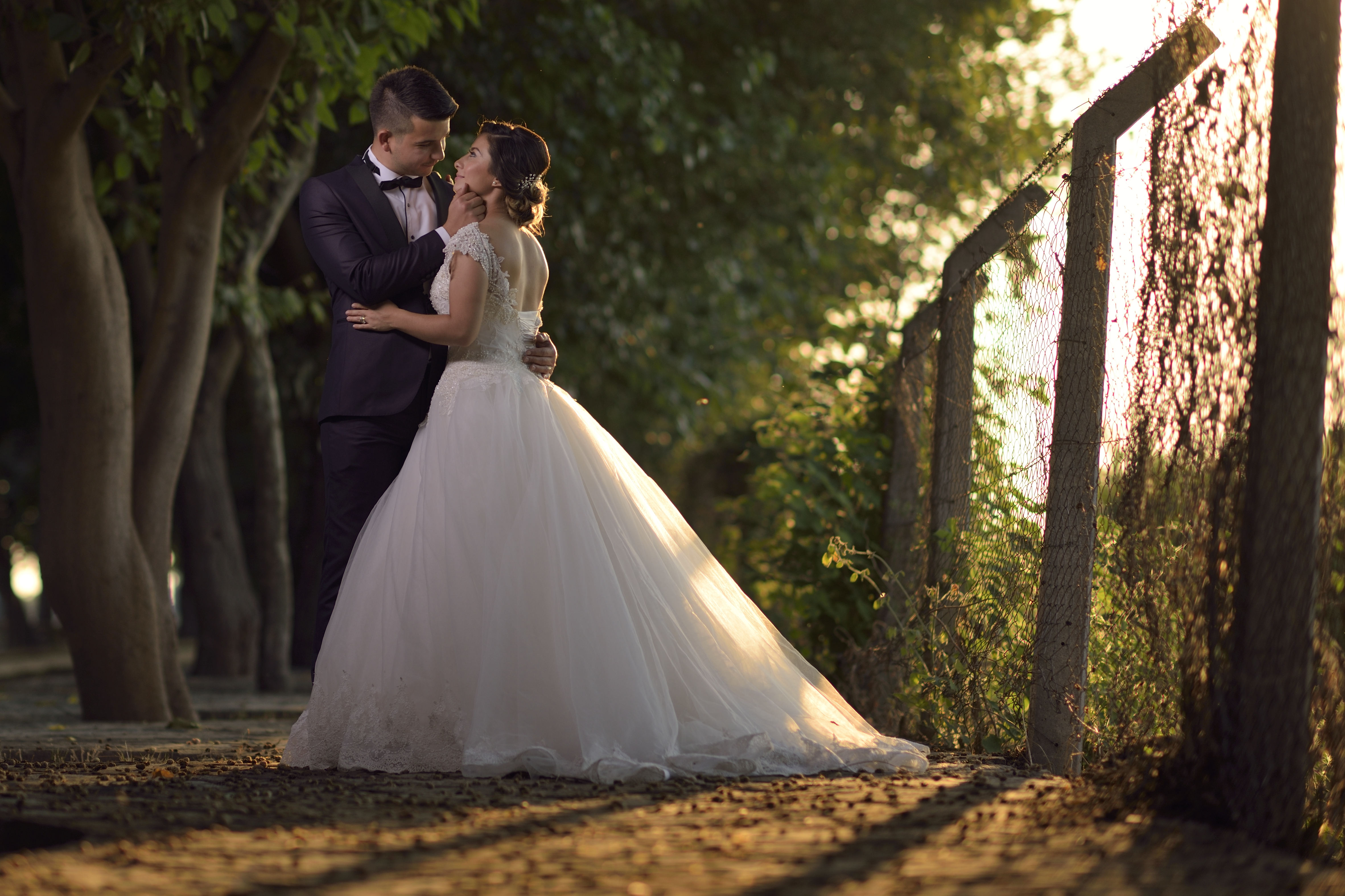 Foto scattata durante un servizio fotografico matrimoniale in riva al lago.